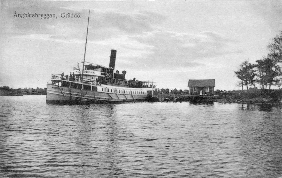 Ångbåtsbryggan, Gräddö, ca 1900.